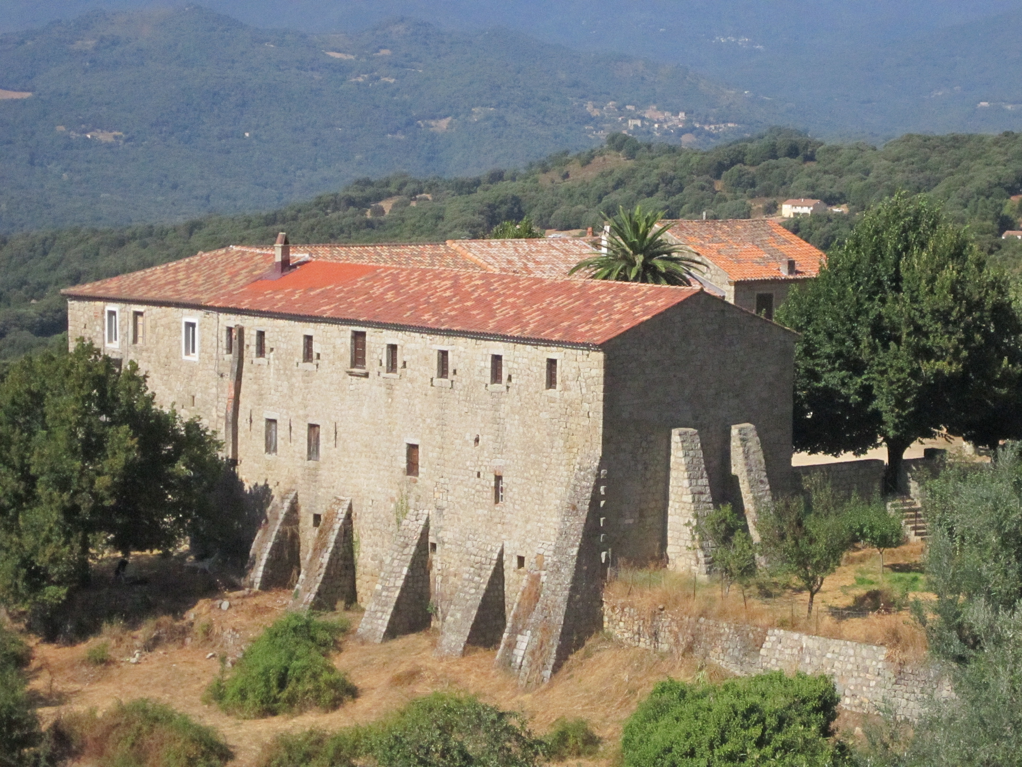 Couvent Saint-François d'Istria, Petreto-Bicchisano, Corse du Sud (Inscrit, 1993) .